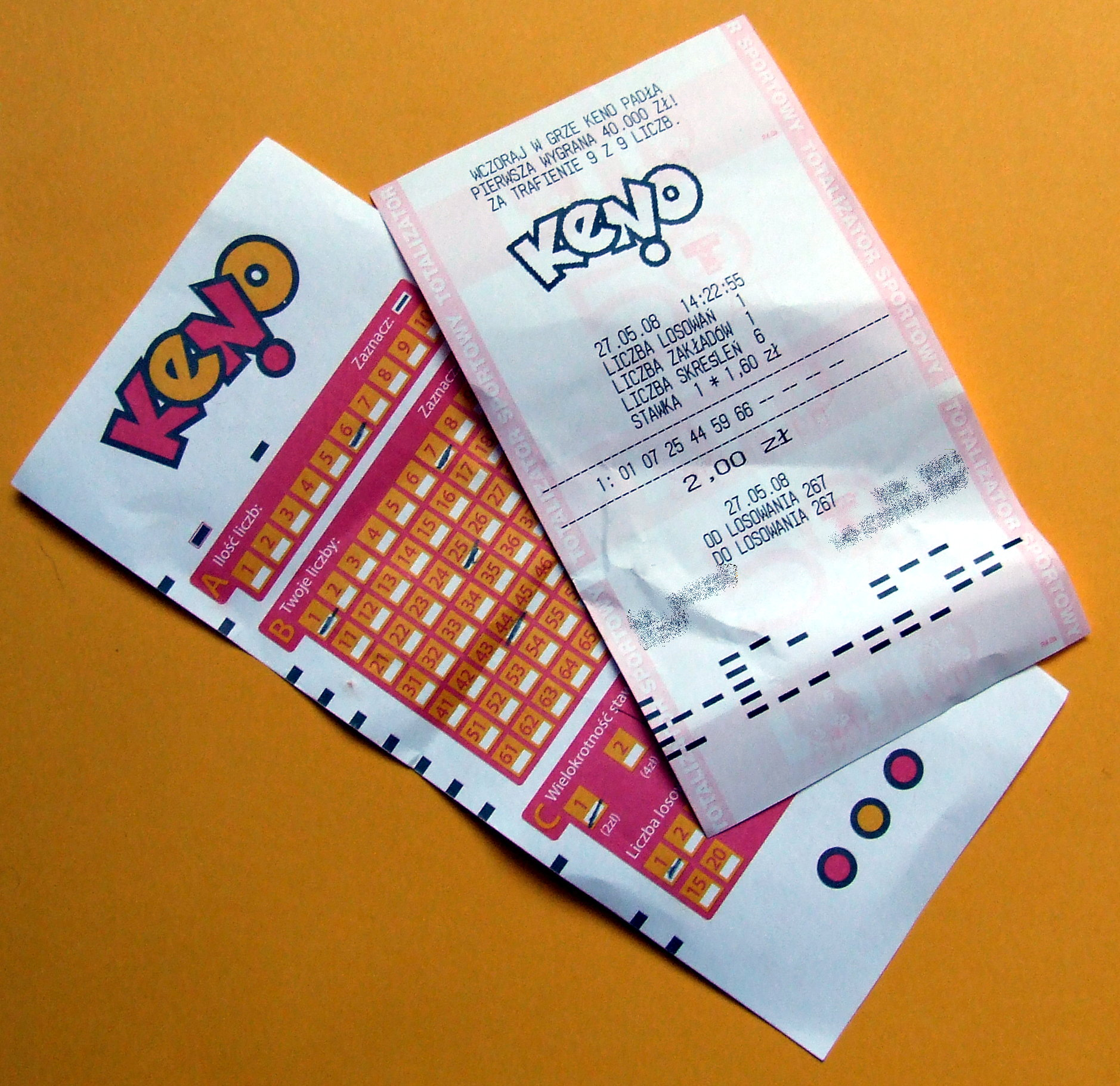 Kupony gry Keno organizowanej przez polski Totalizator Sportowy. Licensing: This image or multimedia was created by Bartosz Senderek. The image or audio is licensed under CC-BY license. Attribution to me is required. Licencja: Ten obrazek lub plik multimedialny został stworzony przez Barotsza Senderka. Został on udostępniony na licencji CC-BY. Informacja o moim autorstwie jest wymagana. "I want to use the image/multimedia. How can I do that?" You can use this image/multimedia freely for any purpose, including commercial use, provided that you license it under the above license. My suggestion is to use text shown below: If you use the image I would appreciate it if you would let me know on my talk page, but this is not required as long as you follow the above license. "Chcę użyć tego pliku. Jak mogę to zrobić?" Możesz używać tej grafiki/multimediów darmowo w każdym celu, włączając użycie komercyjne, udostępniając go dalej na powyższej licencji. Jeśli zdecydujesz się na publikację zdjęcia mojego autorstwa obowiązkowo podpisz go w sposób podany w sekcji "Licensing text". Jeżeli użyłeś mojego pliku możesz powiadomić mnie o tym na mojej stronie dyskusji, lecz nie jest to wymagane, dopóki trzymasz się powyższej licencji.